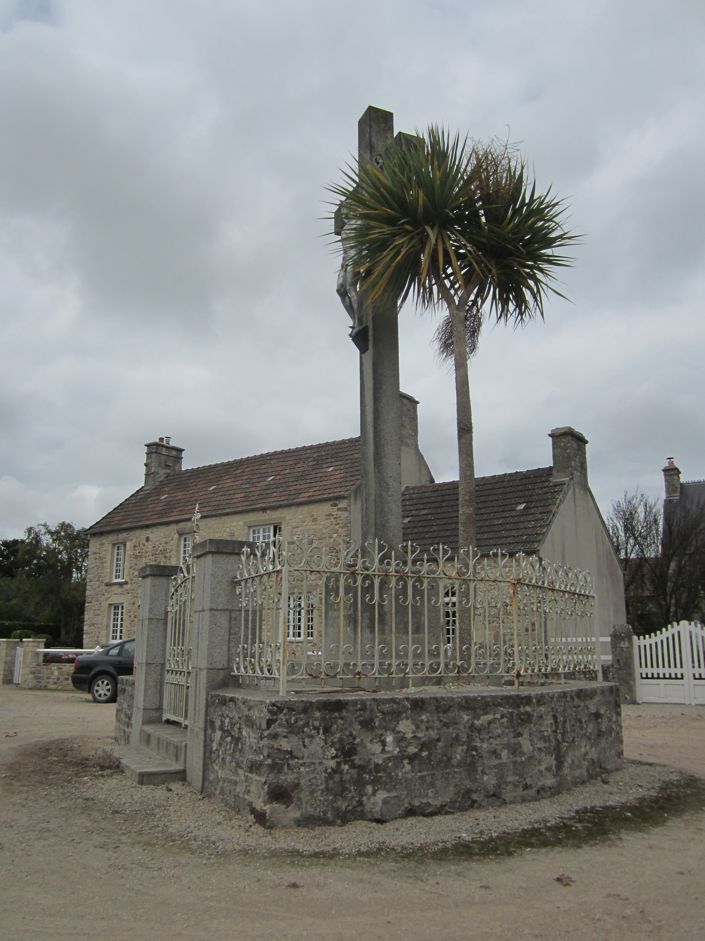 Octeville-l'Avenel, Manche